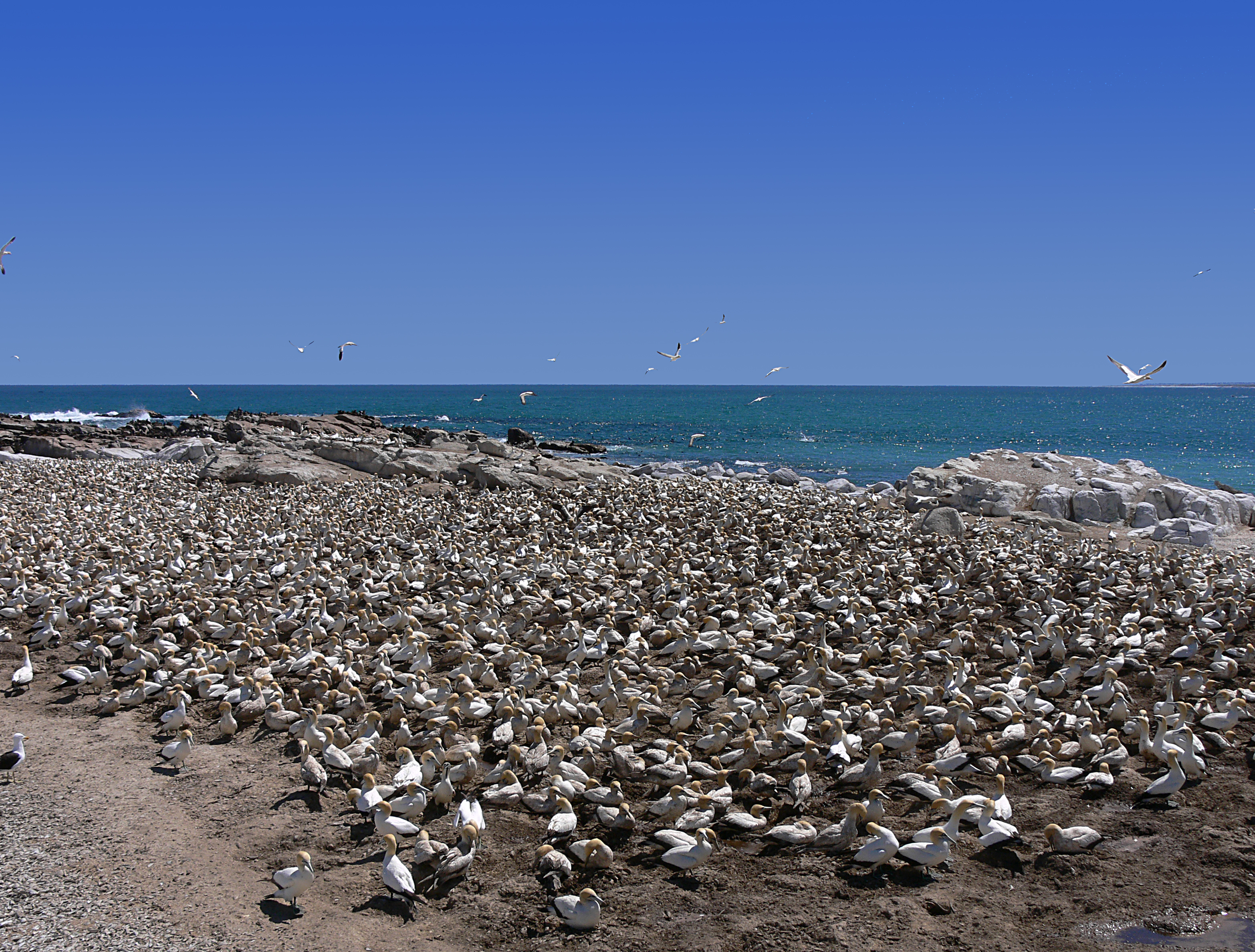 Das Schutzgebiet Bird Island Nature Reserve zum Schutz der Kaptölpel Morus capensis, Lamberts Bay, Westkap, Südafrika